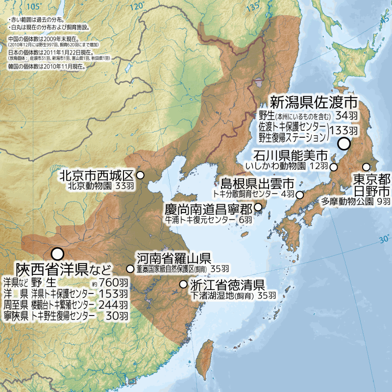 トキ Nipponia nippon の過去の生息地(赤色)と、現在の飼育施設・生息地(白丸)。 中国の個体数は2009年末現在。(2010年12月には野生997羽、飼育620羽にまで増加) 日本の個体数は2011年1月22日現在。(地図中には示していないが放鳥個体34羽のうち3羽が本州にいる。No.18:新潟市、 No.04:富山県、 No.56:秋田県) 韓国の個体数は2010年11月現在。 地図は File:East_Asia_topographic_map.png (by User:Ksiom) を使用。